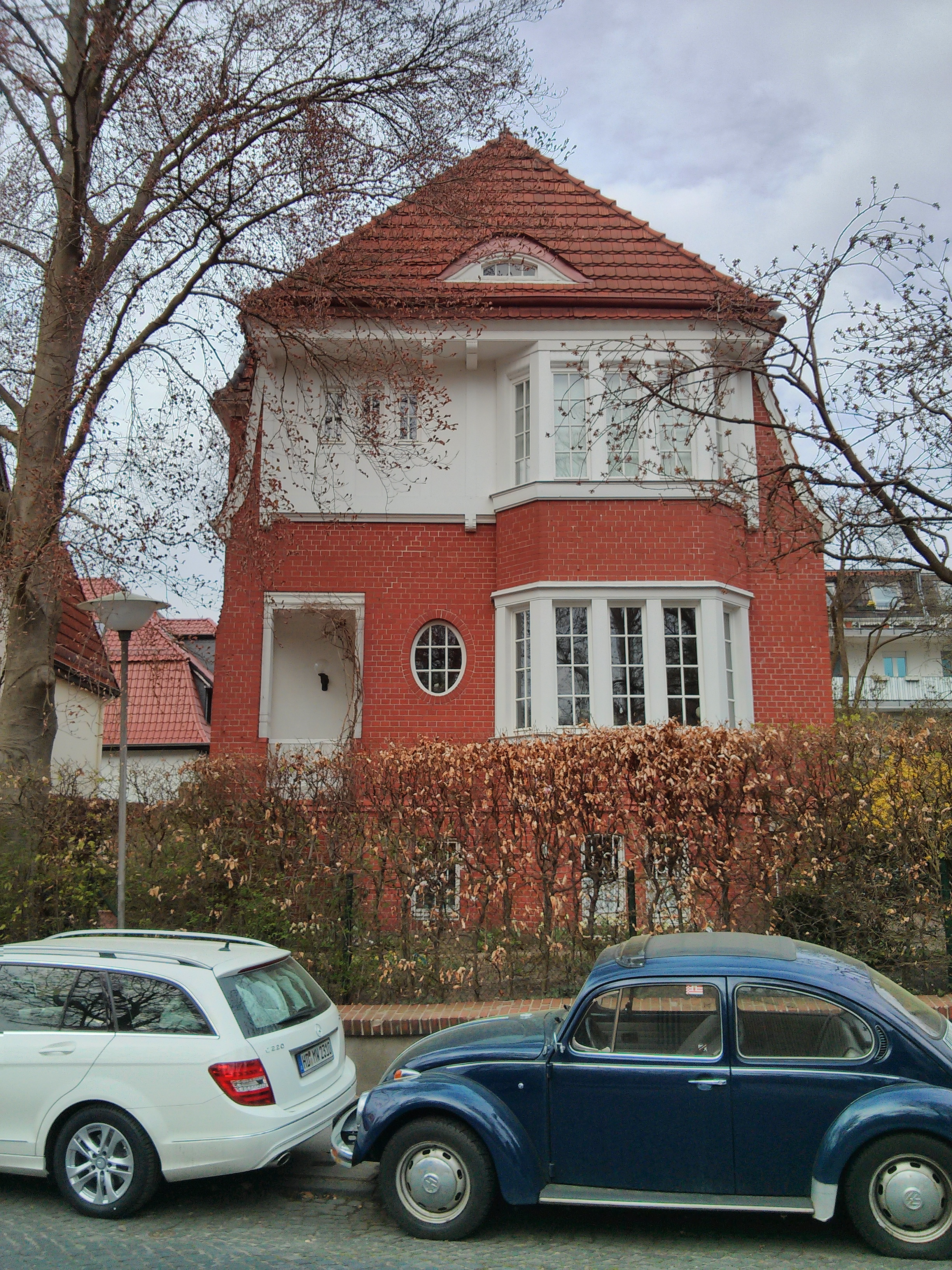 Wohnhaus in Bremen, Richard-Dehmel-Straße 2 Das abgebildete Objekt ist ein geschütztes Kulturdenkmal in der Freien Hansestadt Bremen, mit der Nr. 1033 beim Landesamt für Denkmalpflege registriert.